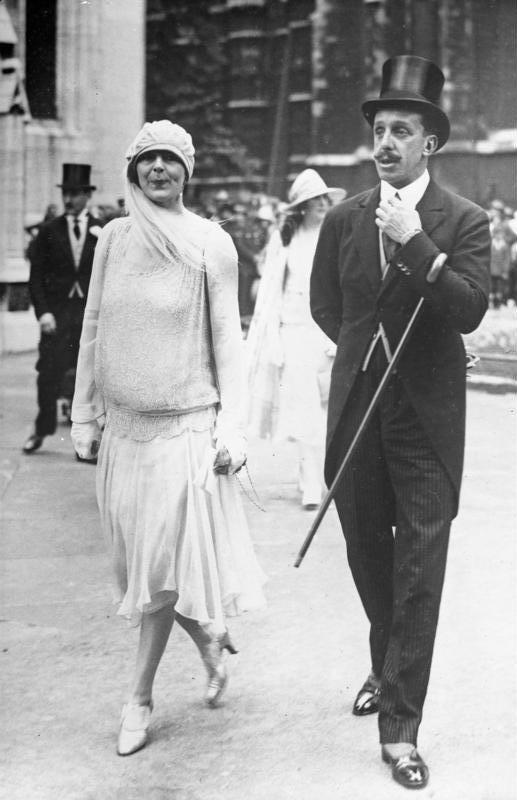 Ex-König Alfons von Spanien, auf einem Kirchgang in London ! Ex-König Alfons auf dem Wege zur Westminster-Abtei.